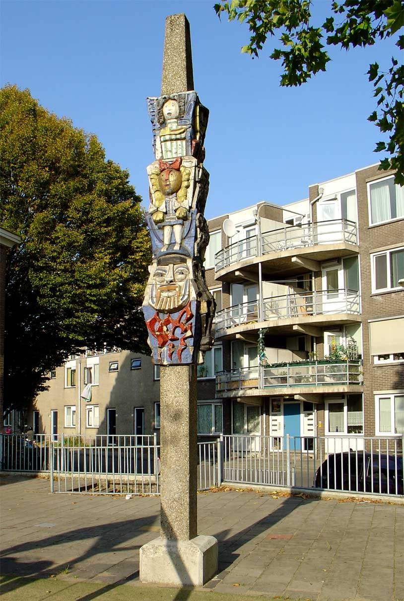 Totempaal door Dick Elffers - Snoystraat te Gouda)